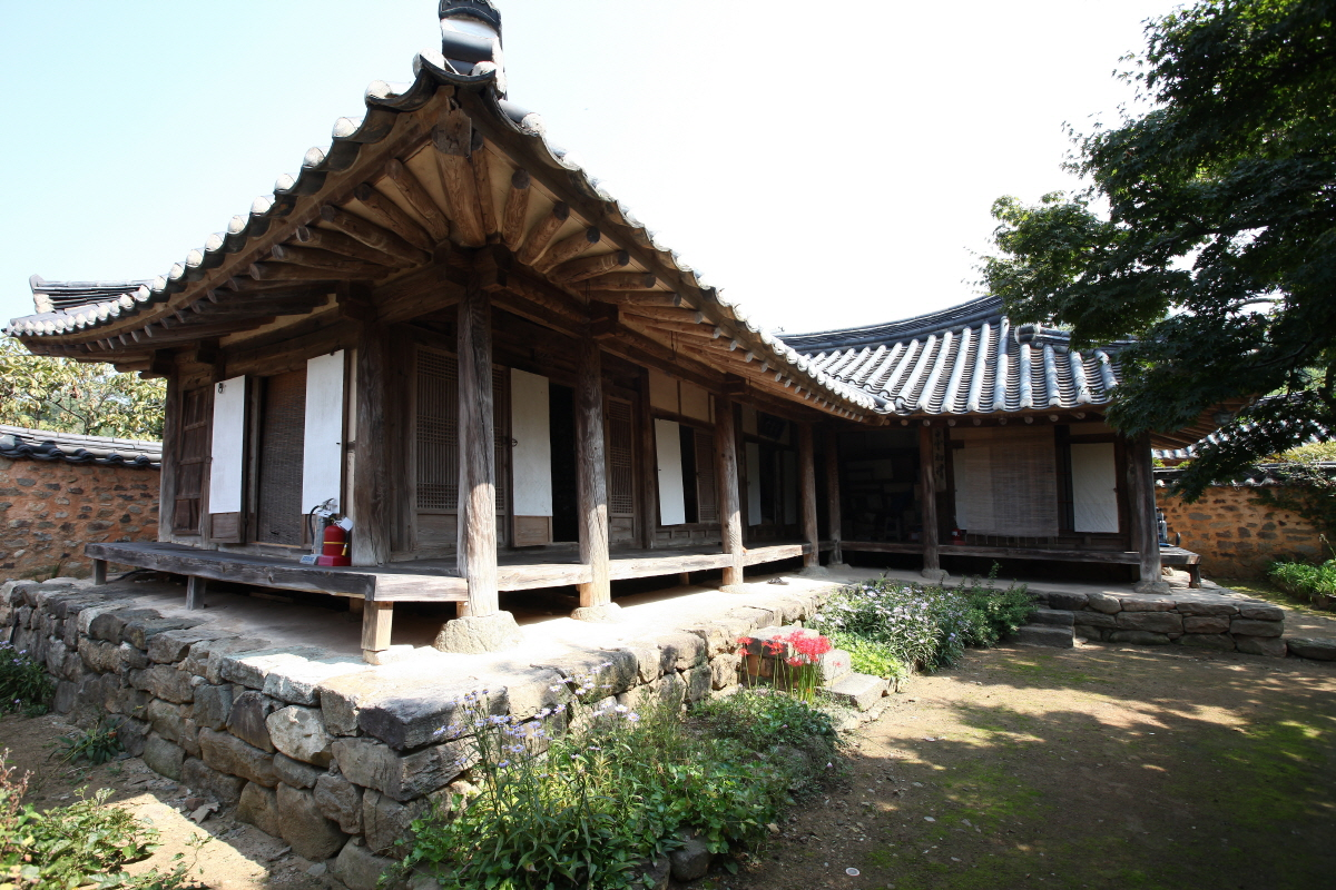 나주 계은 고택 중 안채 (국가민속문화재 제151호)